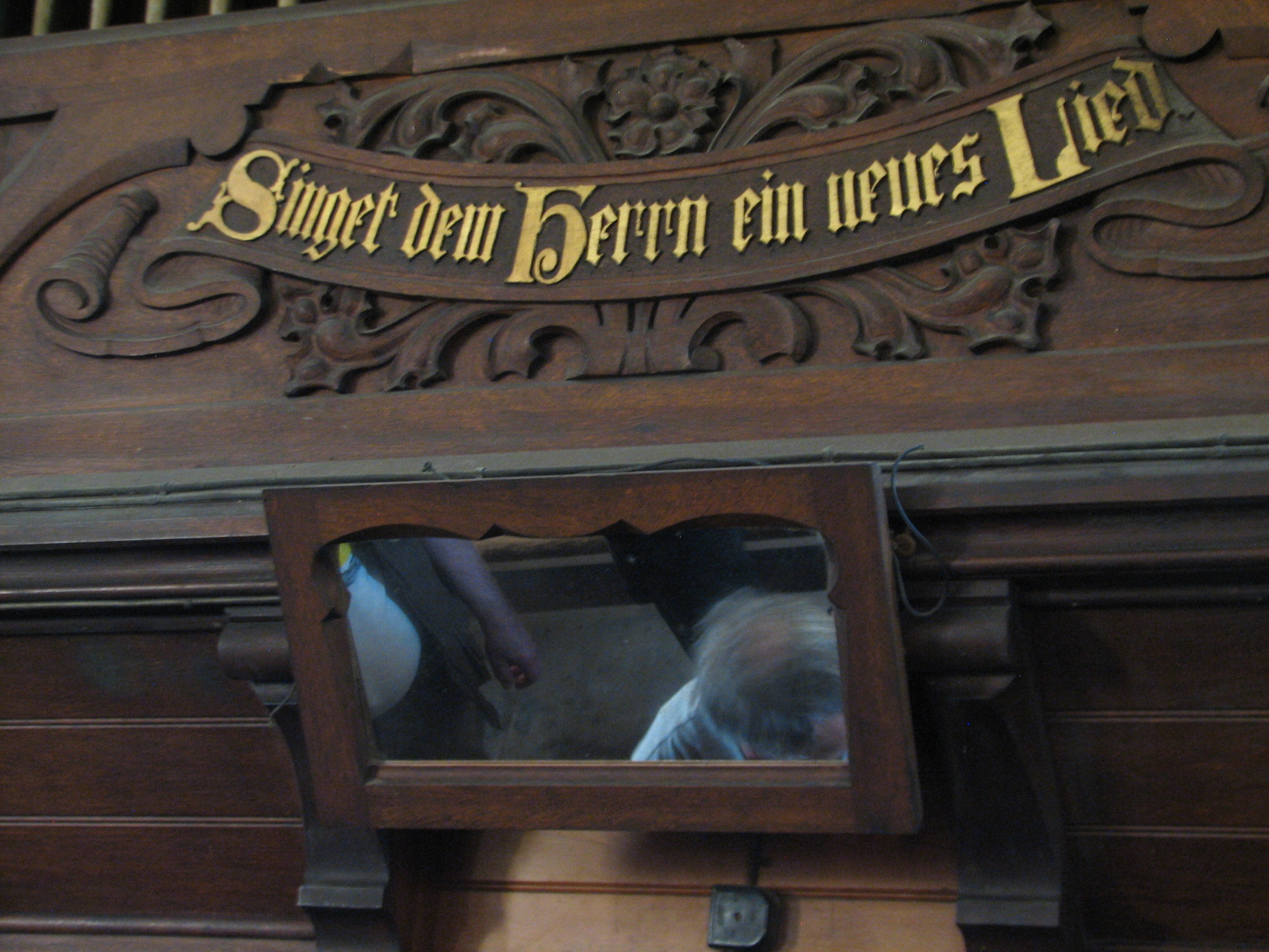 Orgel-Spruch "Singet dem Herrn ein neues Lied" - seit 1975 jedoch schweigt die Jemlich-Orgel